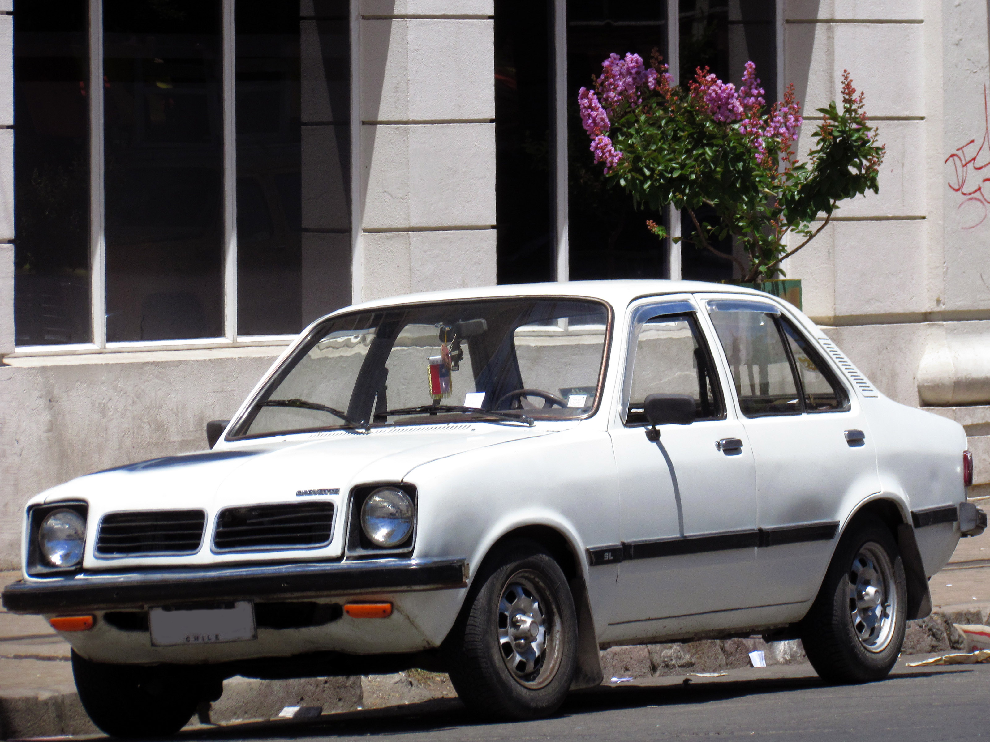 Chevrolet Chevette 1.4 SL Sedan 1980